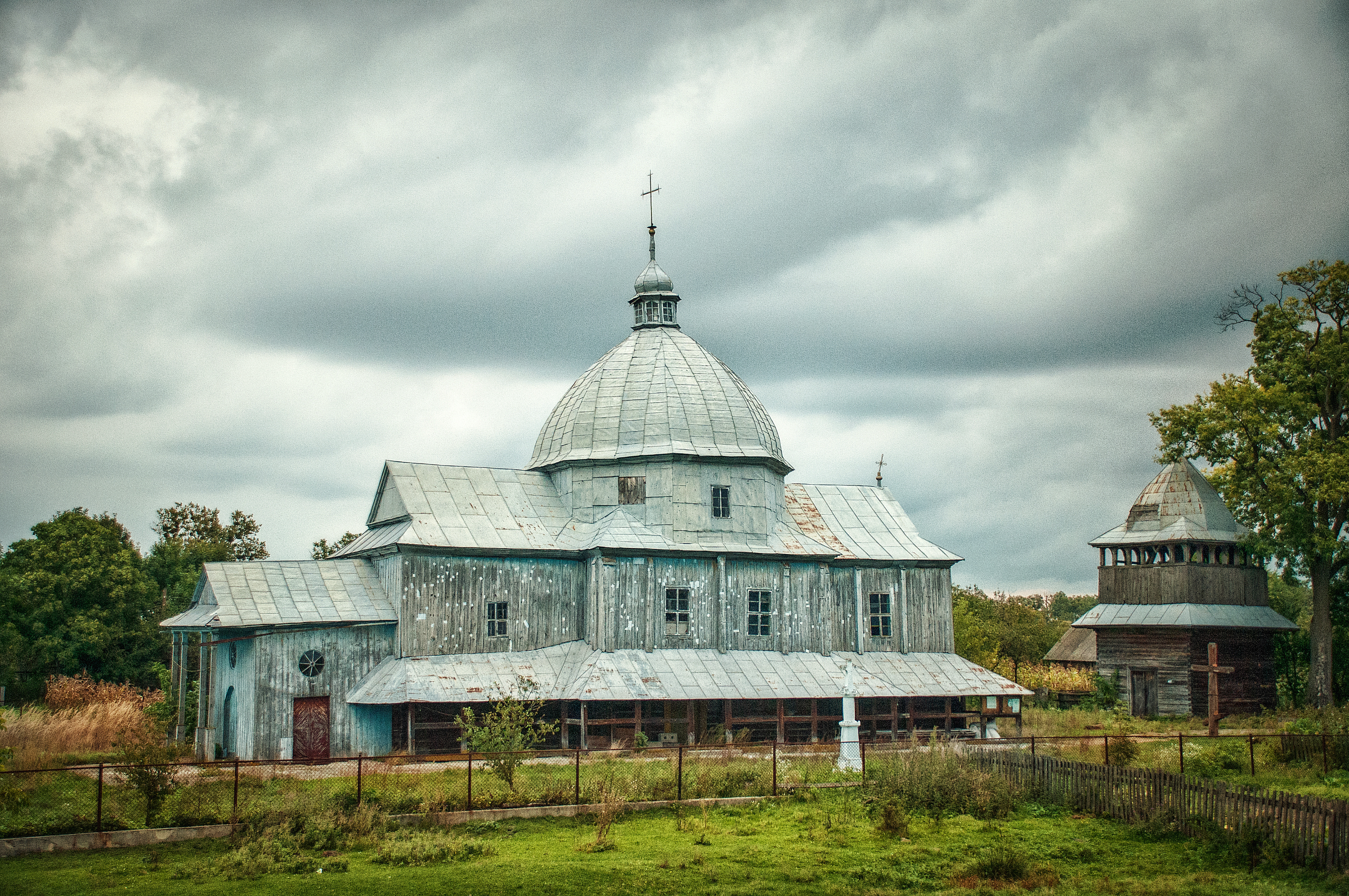 Церква Св. Миколая (дер.), Станіславчик